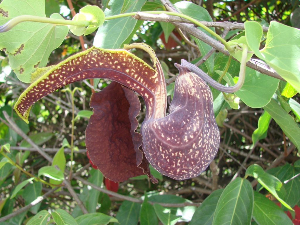 Aristolochia galeata - ARISTOLOCHIACEAE Parque Nacional de Brasília - Distrito Federal - Brasil.